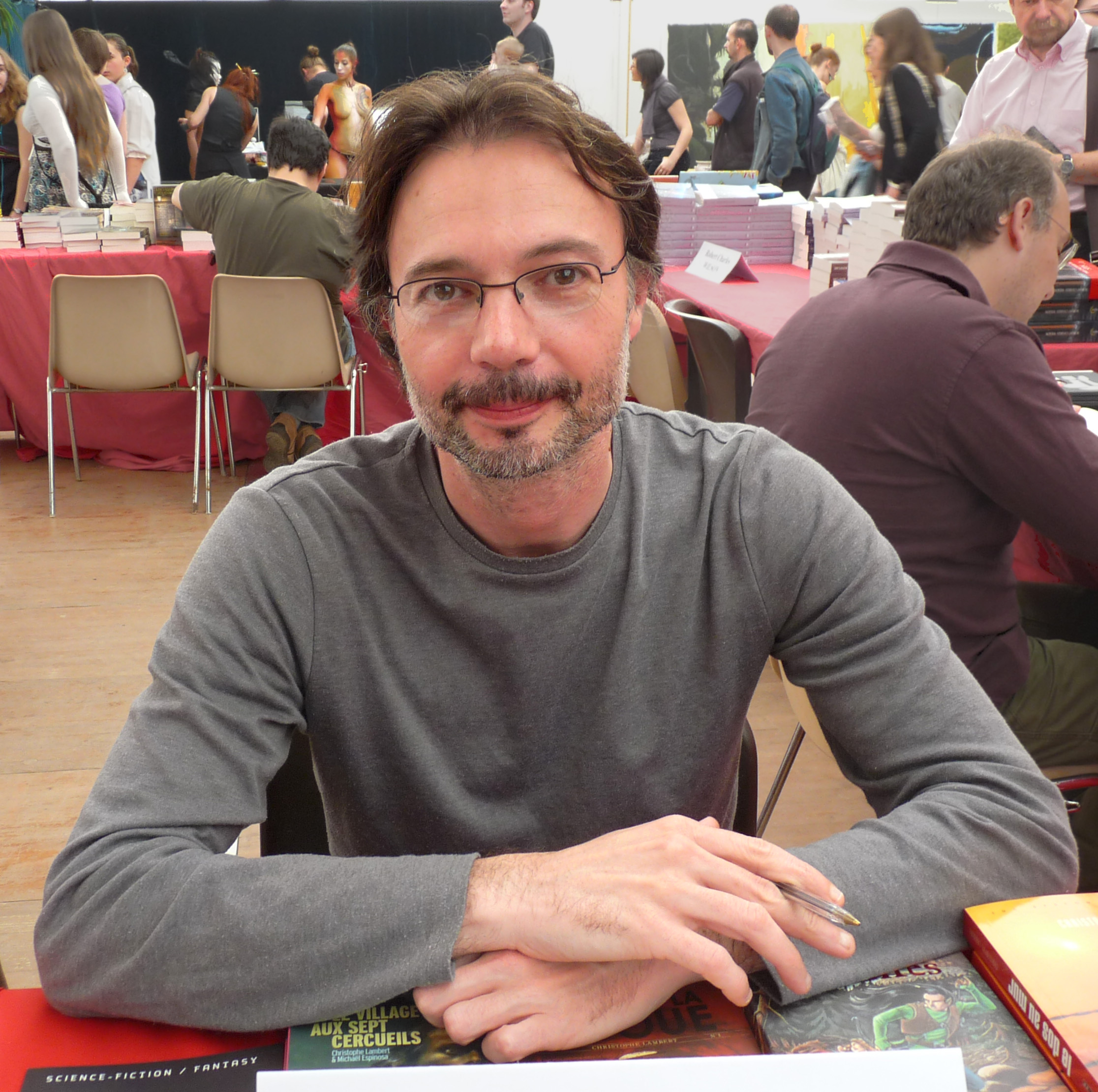 L'écrivain de science-fiction Christophe Lambert